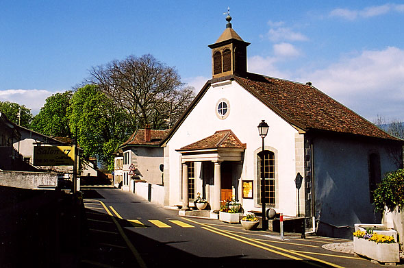 Prot. Kirche (le temple) von Avully, April 2001